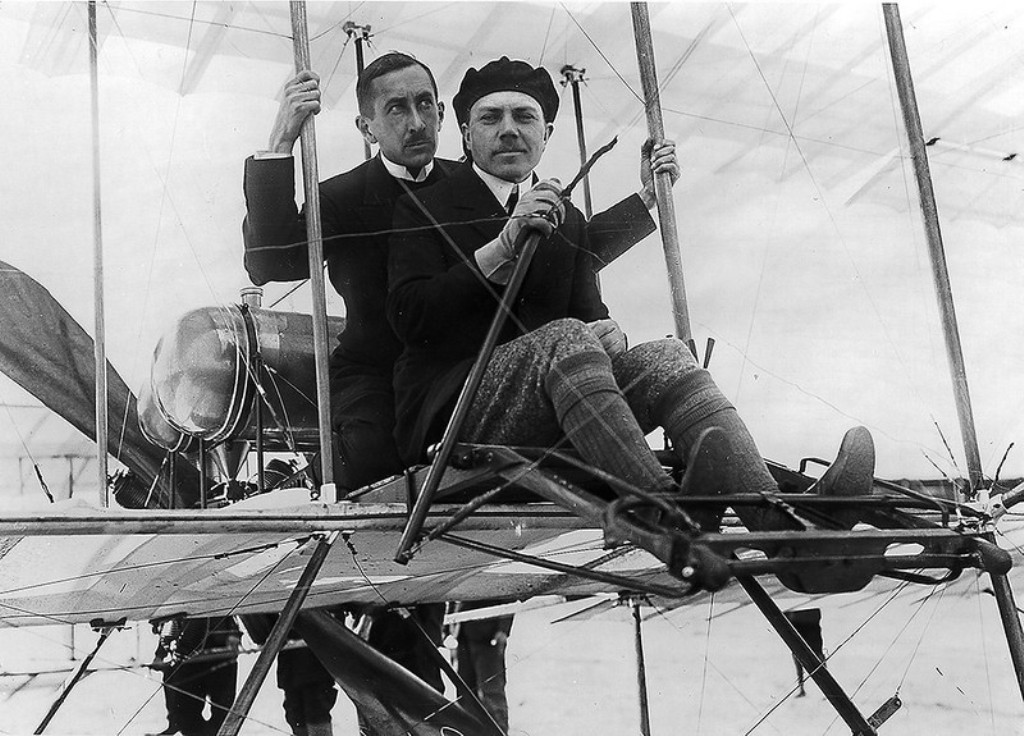 Лётчики Н. Е. Попов и М. Н. Ефимов во время полетов во Франции